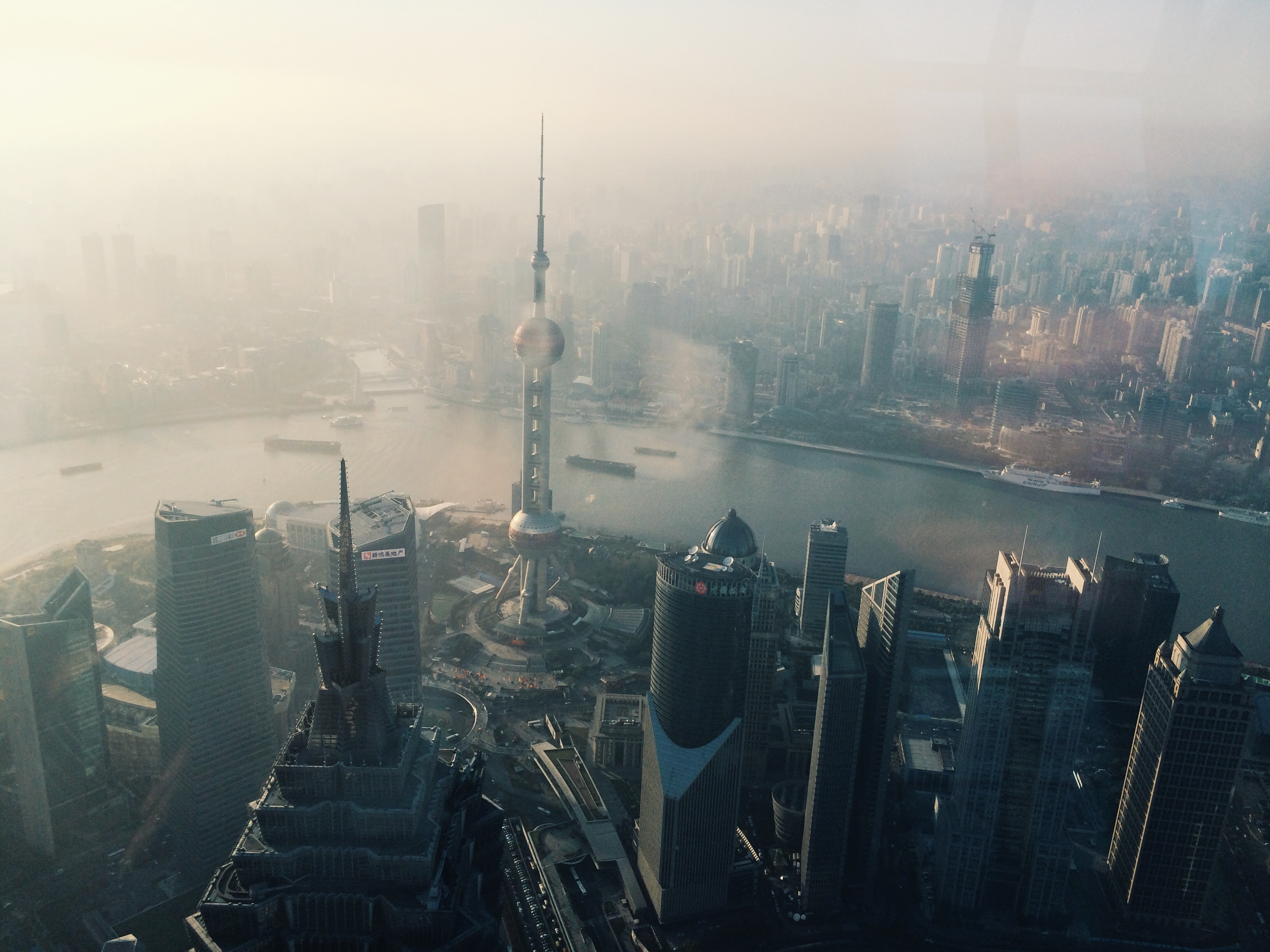 Vido desupre al altegaj turdomoj en ĉerivera urbo, tra nebulo.